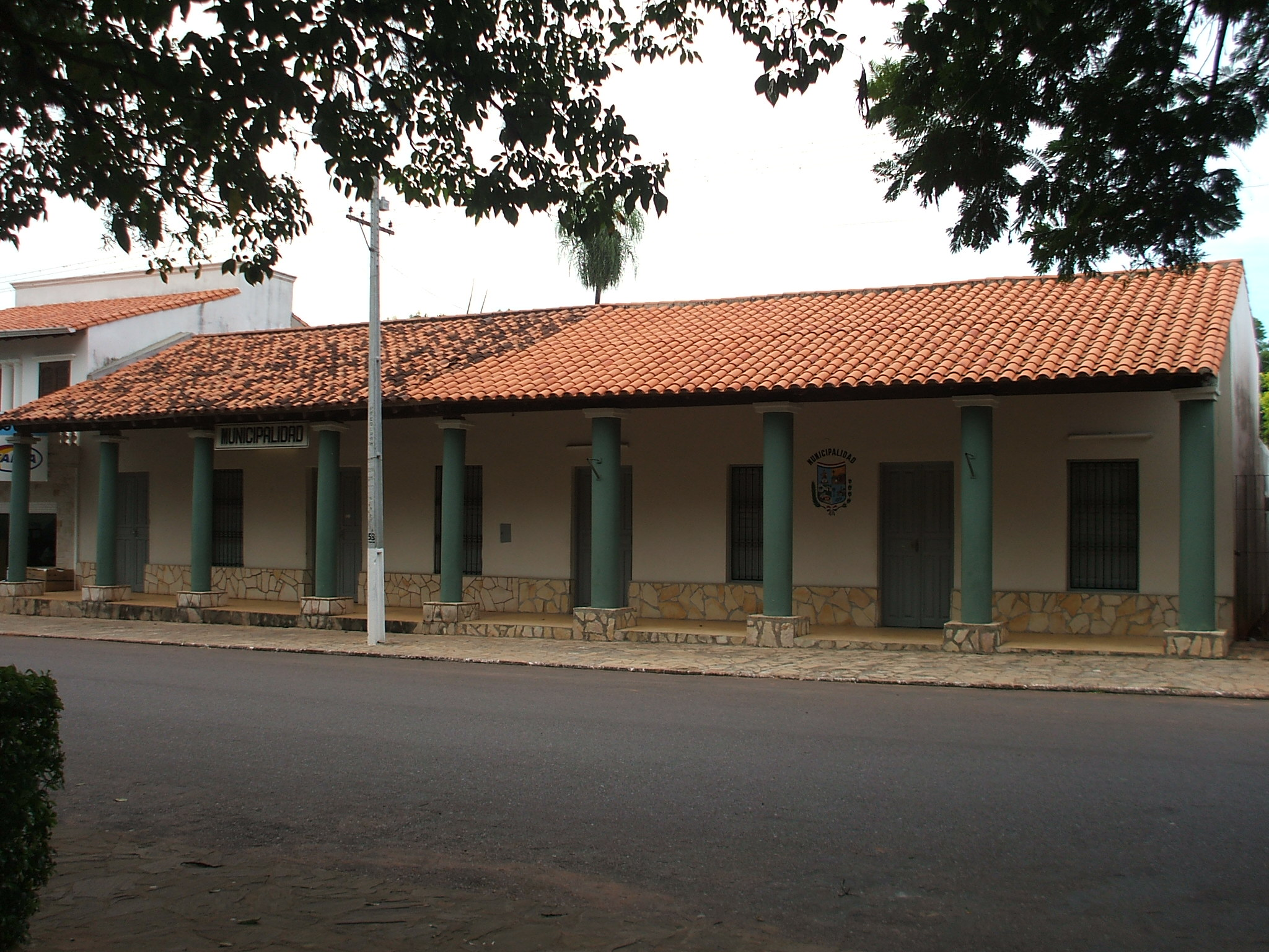 Municipalidad